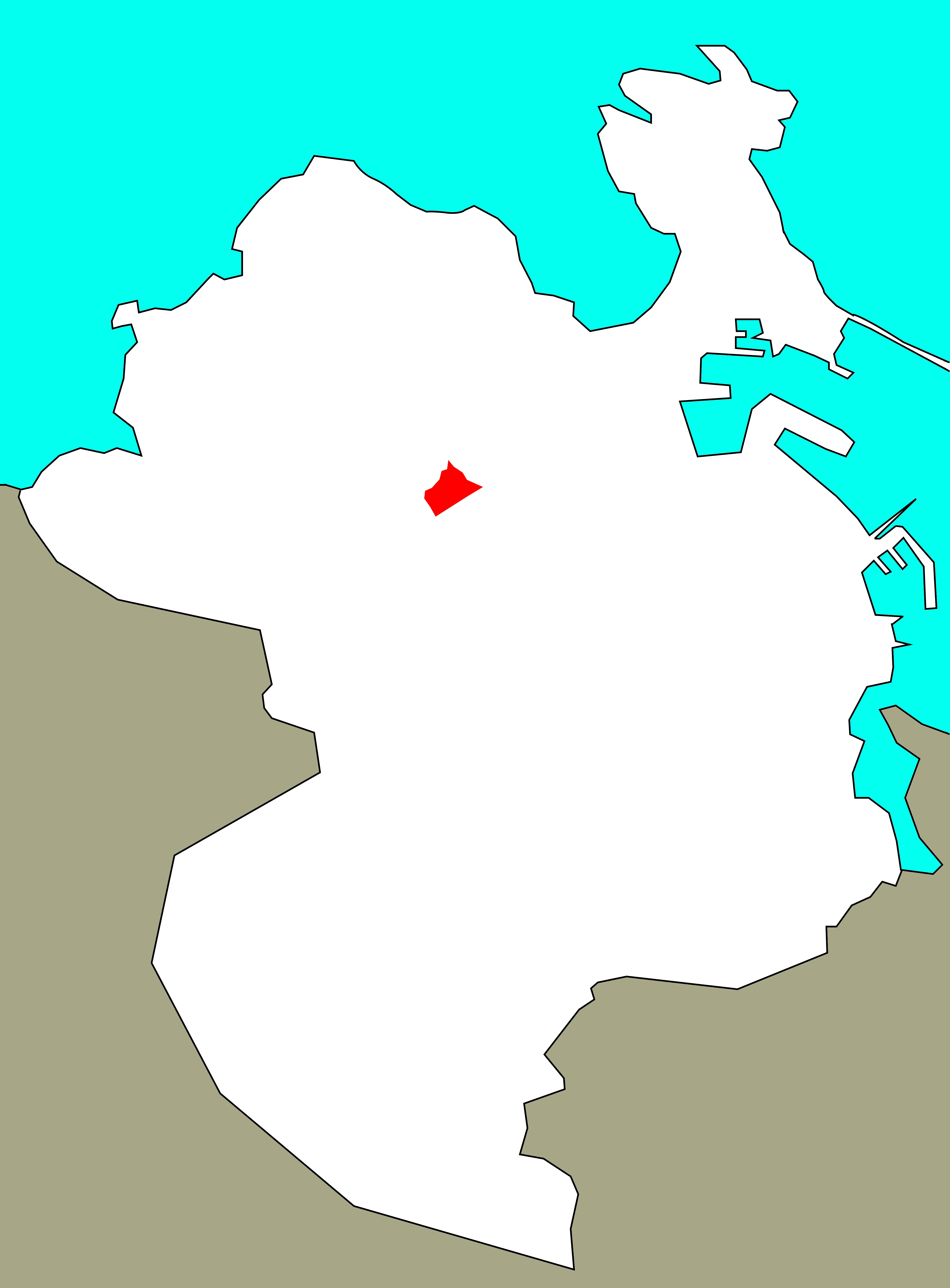 Situación da Silva no concello da Coruña.[1]